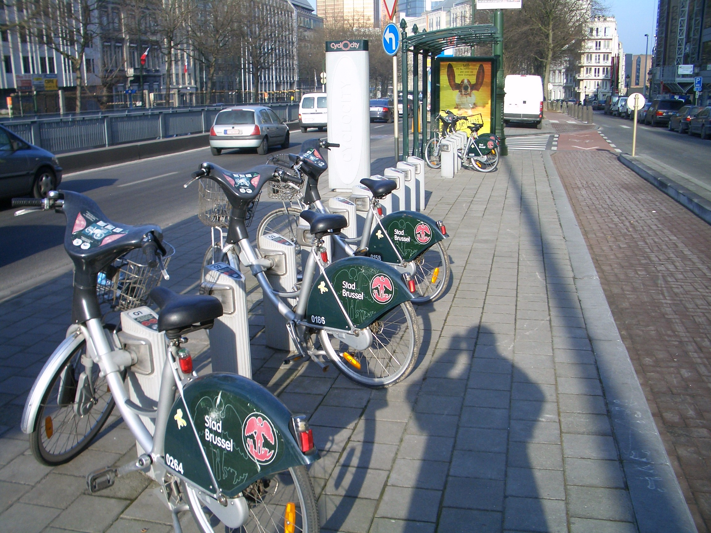 Nyilvános kerékpárkölcsönző állomás Brüsszelben (Kunstlaan-Wetstraat, metro Kunst-Wet)